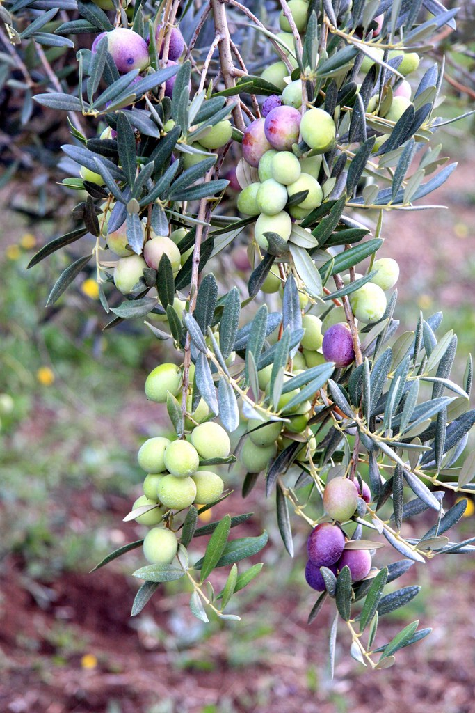 Olive della varietà (cultivar) Itrana allevate nell'azienda agricola Venditti Renzo a Cecchina di Roma - Italia.